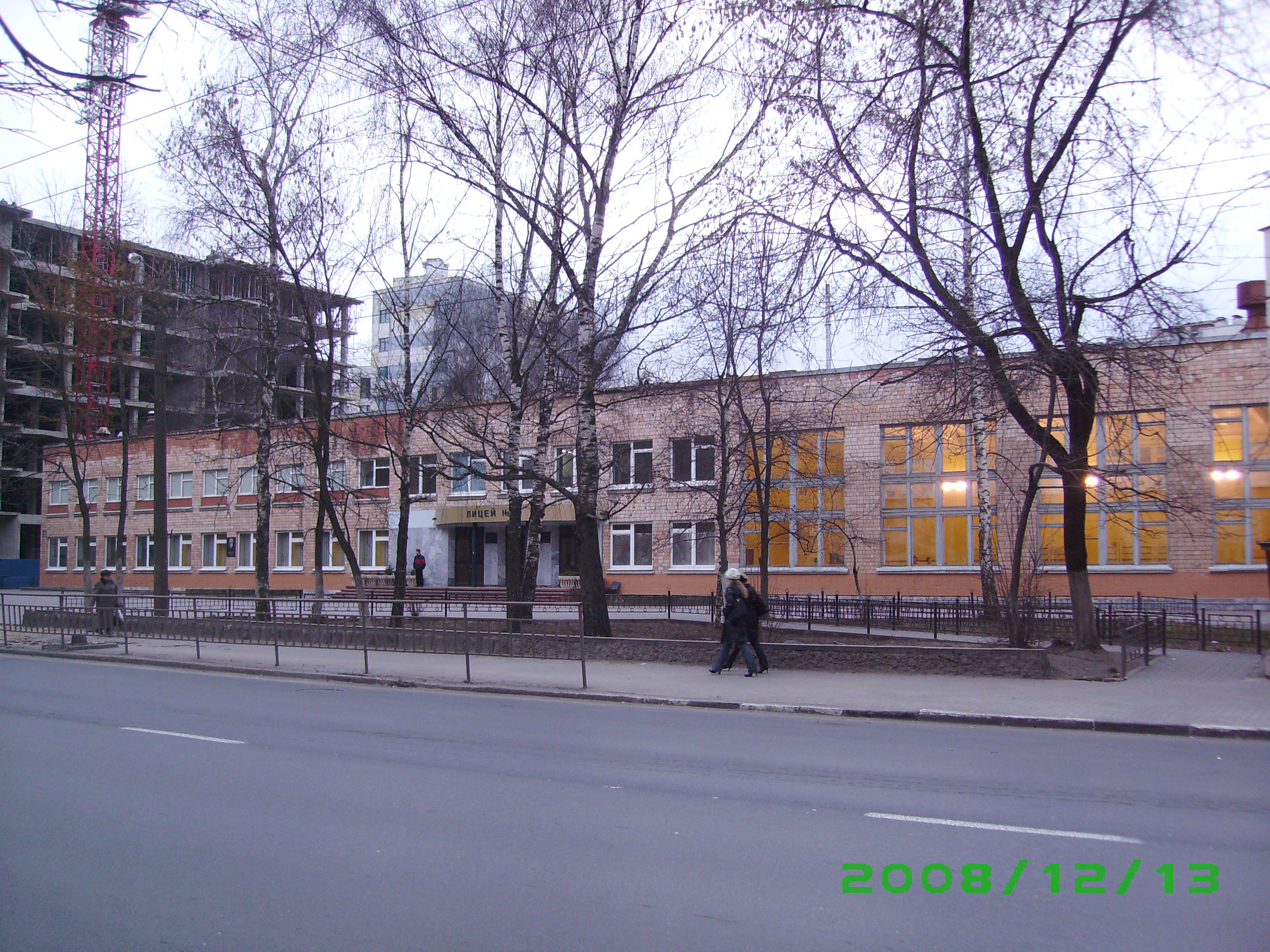 Варварская 15а. Нижний Новгород. Лицей №40.